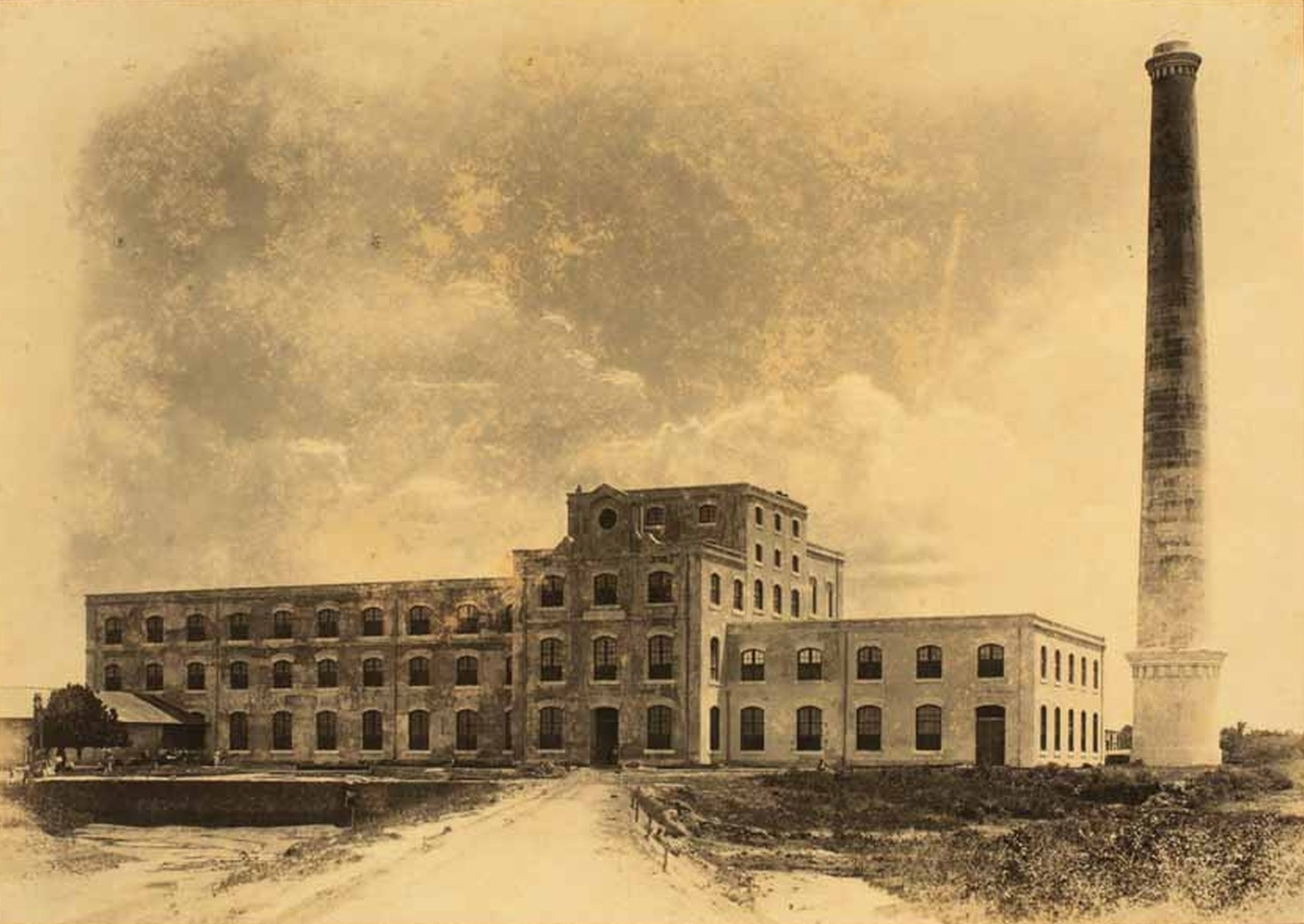 A Fábrica Tacaruna (antiga Usina Beltrão), primeira refinaria da América do Sul e primeira construção em concreto armado do Brasil. Foi erguida entre 1890 e 1895.